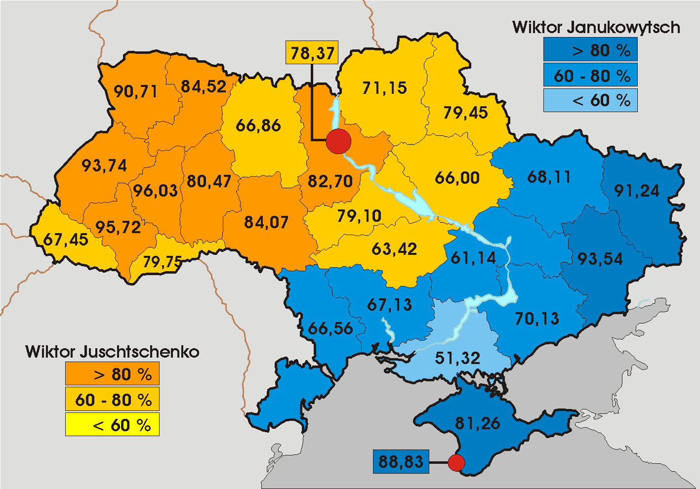 Ukrainian presidential election, 26/12/2004 - by Oblast; Election présidentielle ukrainienne, le 26/12/2004, par Oblast.